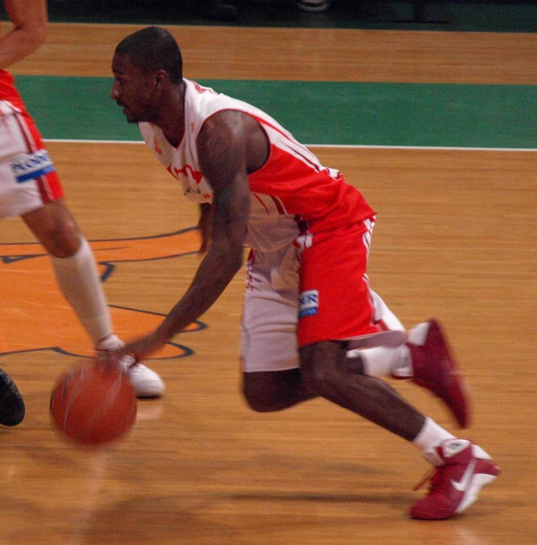 Dean Taquan con la camiseta del CB Murcia en el partido que enfrentó a su equipo ante el DKV Joventut en el Olímpico de Badalona correspondiente a la temporada regular de la liga ACB 2008/09